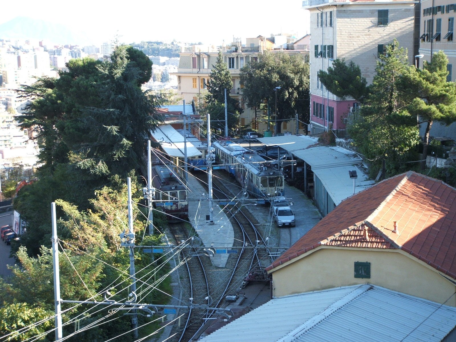 Immagine da Genova